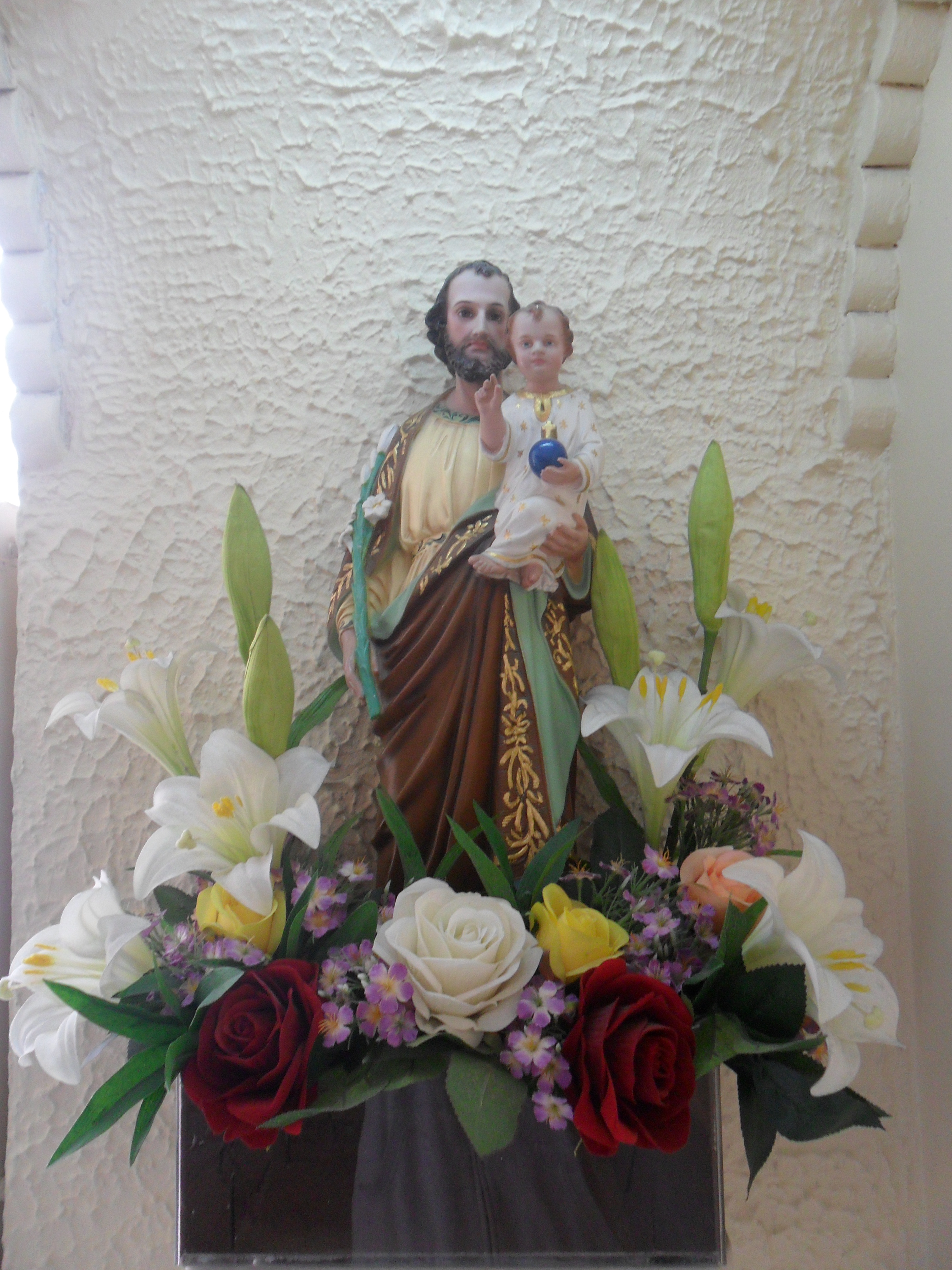 中文（香港）: 聖老楞佐堂, 香港, 中國